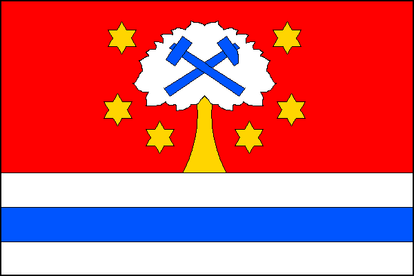 vlajka, Ruda nad Moravou, okres Šumperk